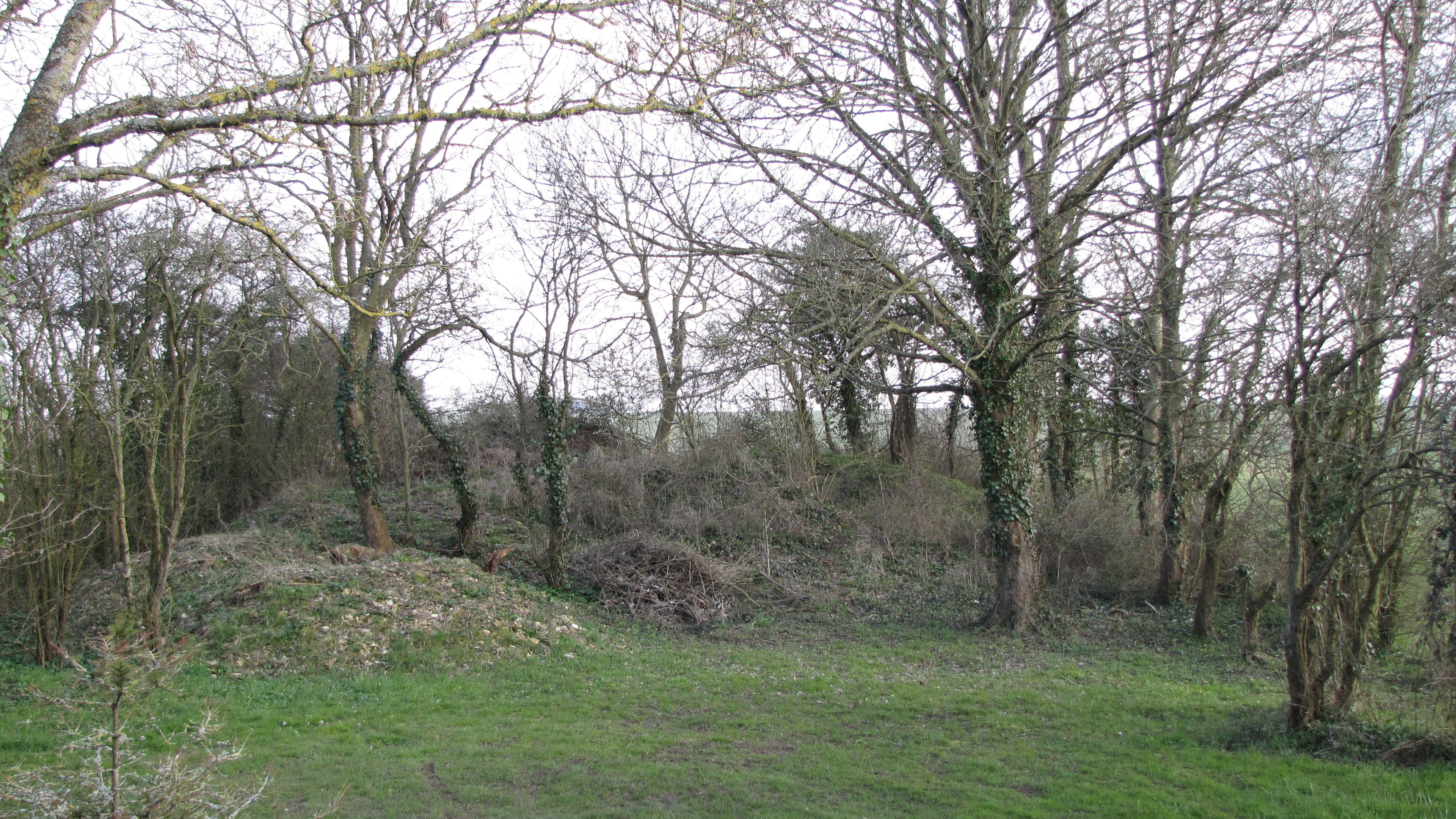 Tumulus en face du dolmen des Bignes.